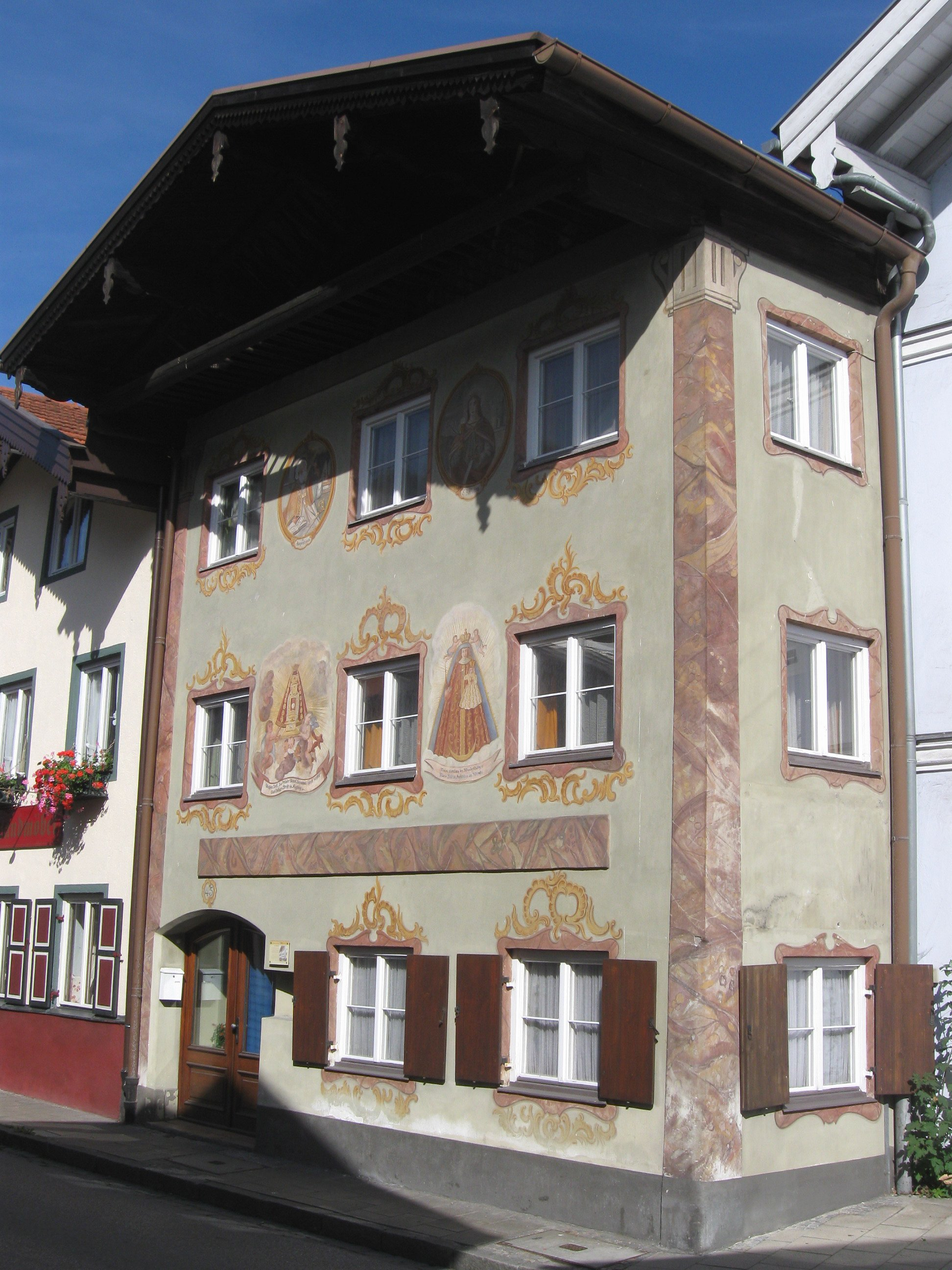 Obermarkt 45; Haus mit Flachsatteldach, Spätrokokofresken, Hochlaube und Lüftungsgitter im Giebel, Ende 18. Jahrhundert.